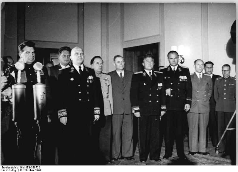 ADN-ZB-SNB Berlin: Armeegeneral W.I. Tschuikow (2.v.l.) empfing das Präsidium der Provisorischen Volkskammer der Deutschen Demokratischen Republik und den Ministerpräsidenten Otto Grotewohl in Anwesenheit des Außerordentlichen Botschafters der UdSSR in Deutschland W.S. Semjonow (vorn 3.v.l.). UBz.: Armeegeneral W.I. Tschuikow und der Außerordentliche Botschafter der UdSSR W.S. Semjonow mit ihren Stäben. 4153-49 10. Oktober 1949